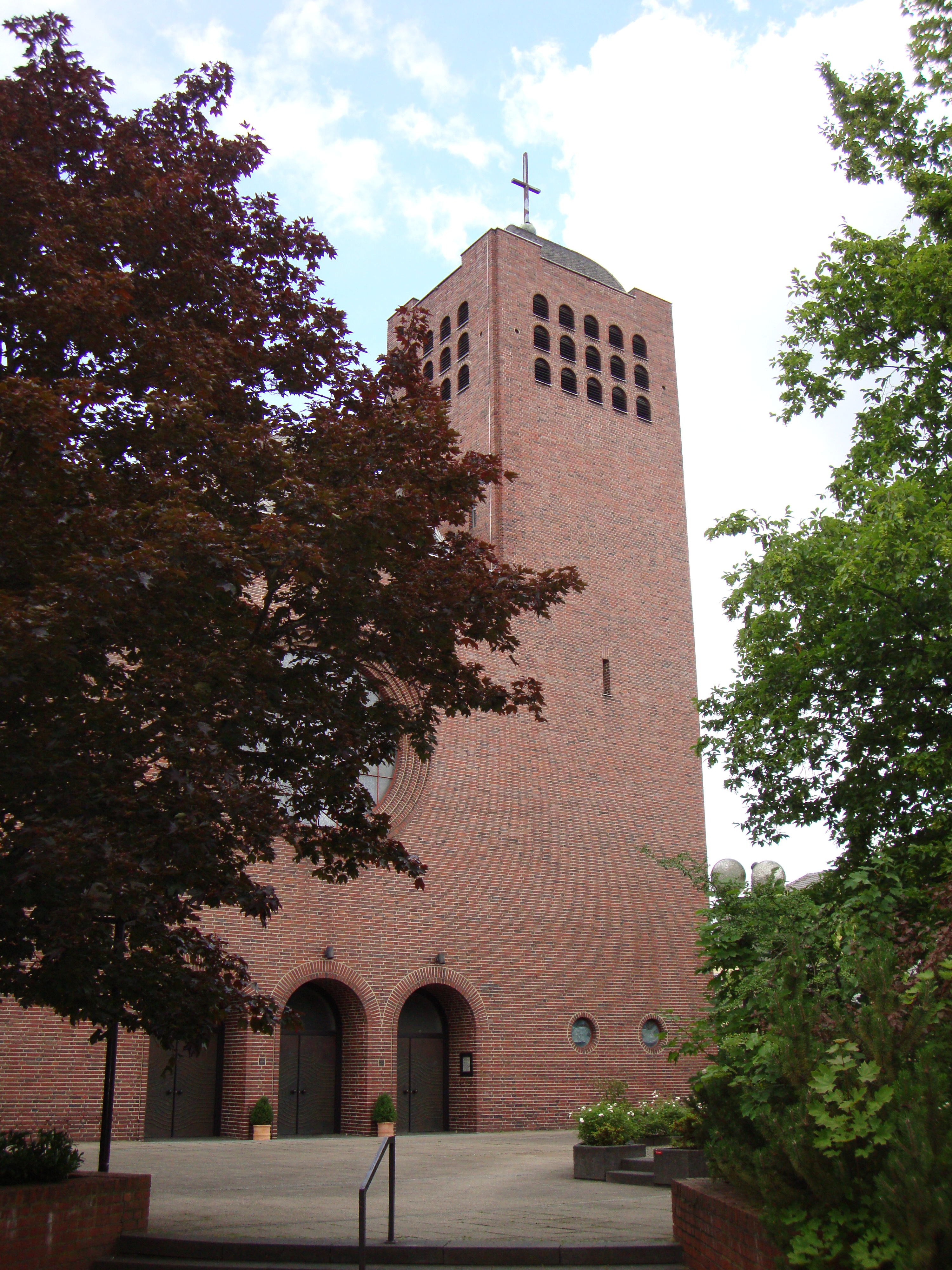 Röm.-kath. Kirche St. Joseph in Bonn-Castell, Ecke Graurheindorfer Straße/ Kaiser-Karl-Ring.